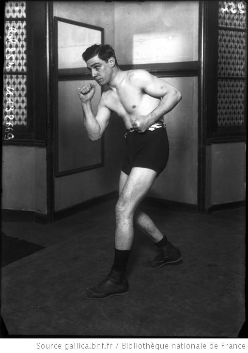 Boxeur Suisse Frank Erne (1875-1954)